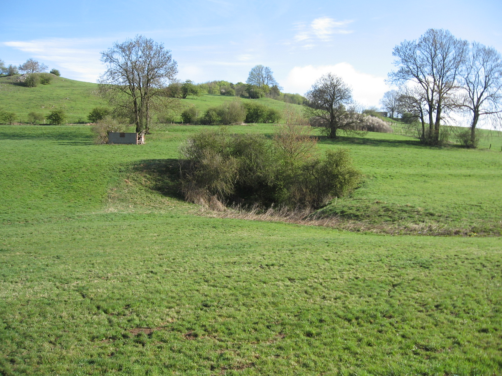 Naturdenkmal Schwalgloch Keffelke (Buschbereich im Bildvordergrund), Landschaftsschutzgebiet Keffelke und Naturschutzgebiet Schaaken obehalb der Buschreihe.